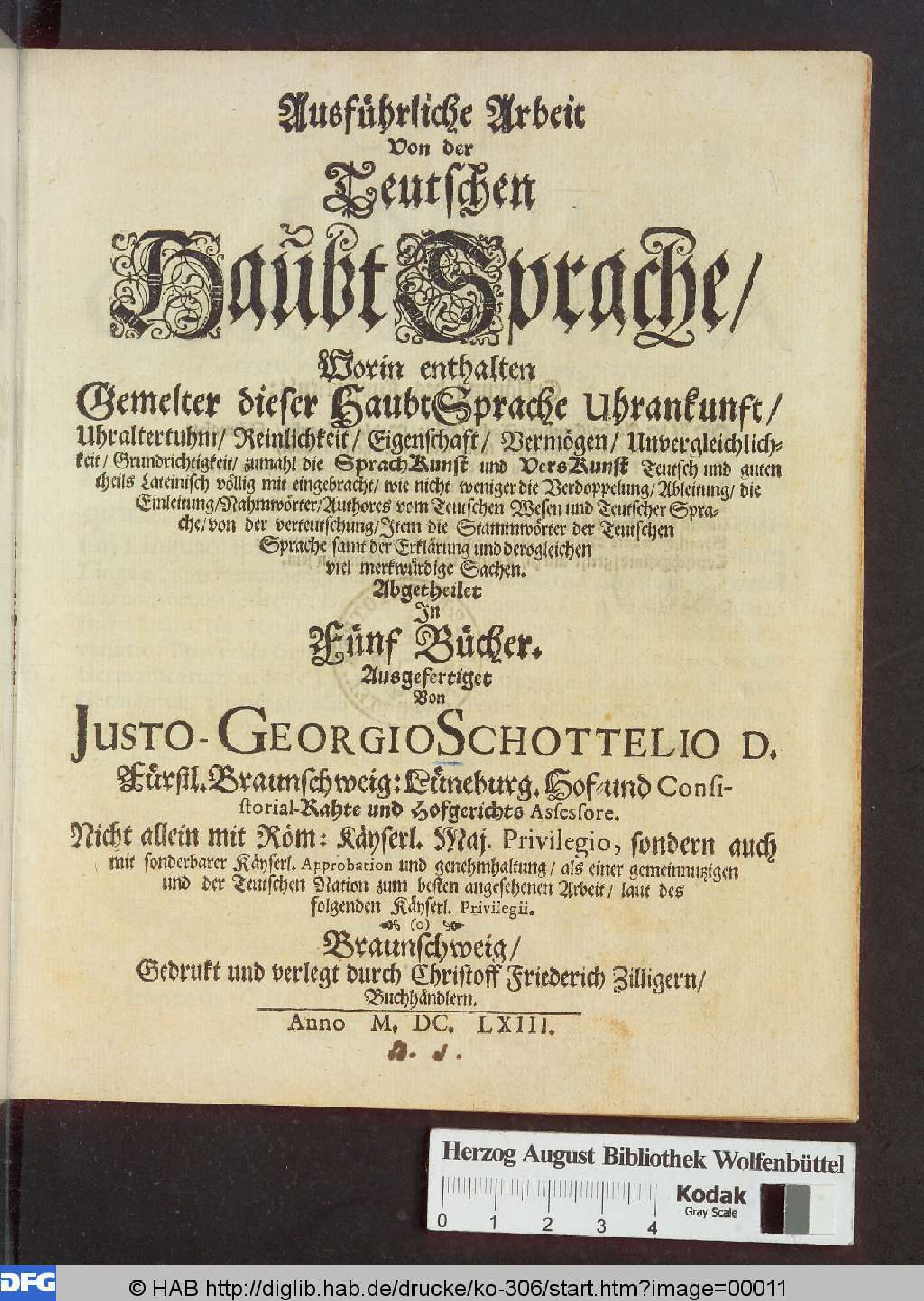 Frontespizio